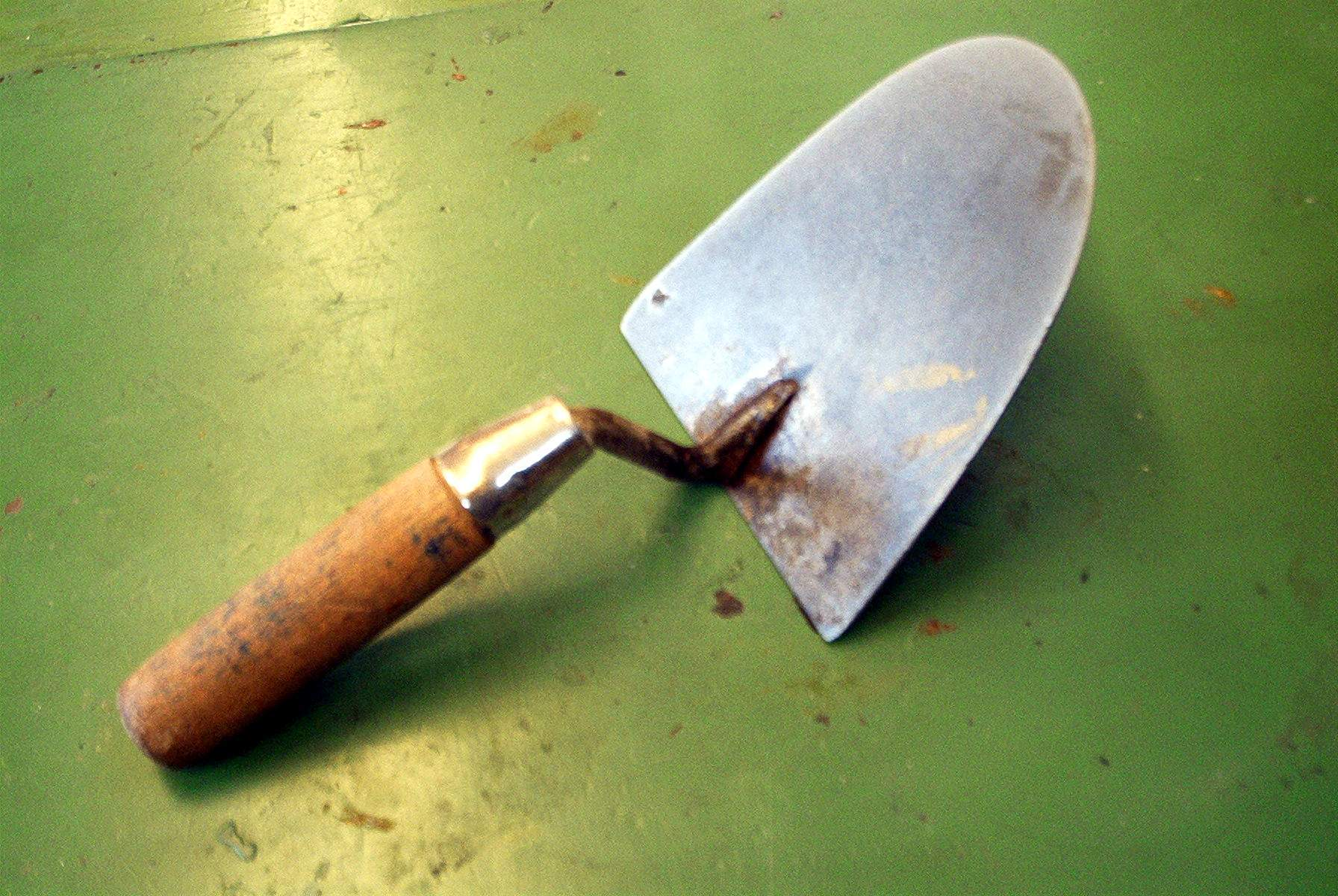 zelfgemaakte foto bestemd voor publiek domein. Martink